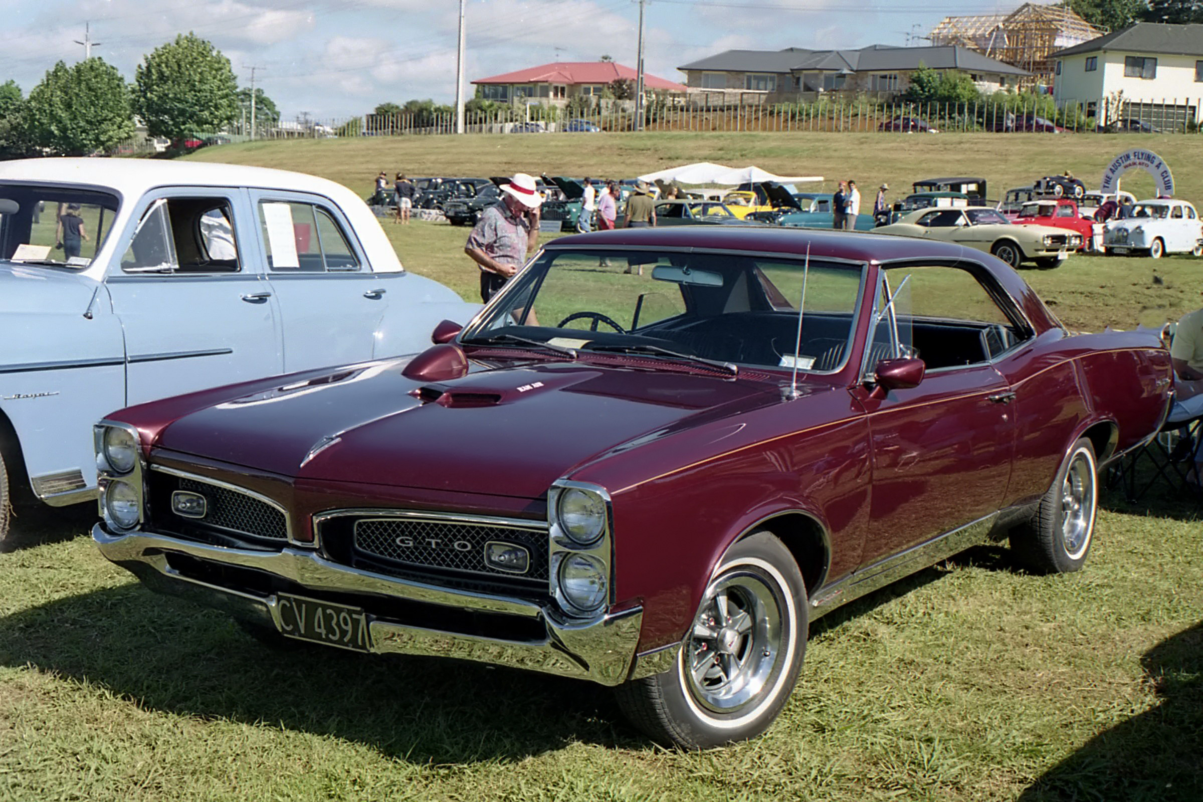 Auckland,New Zealand